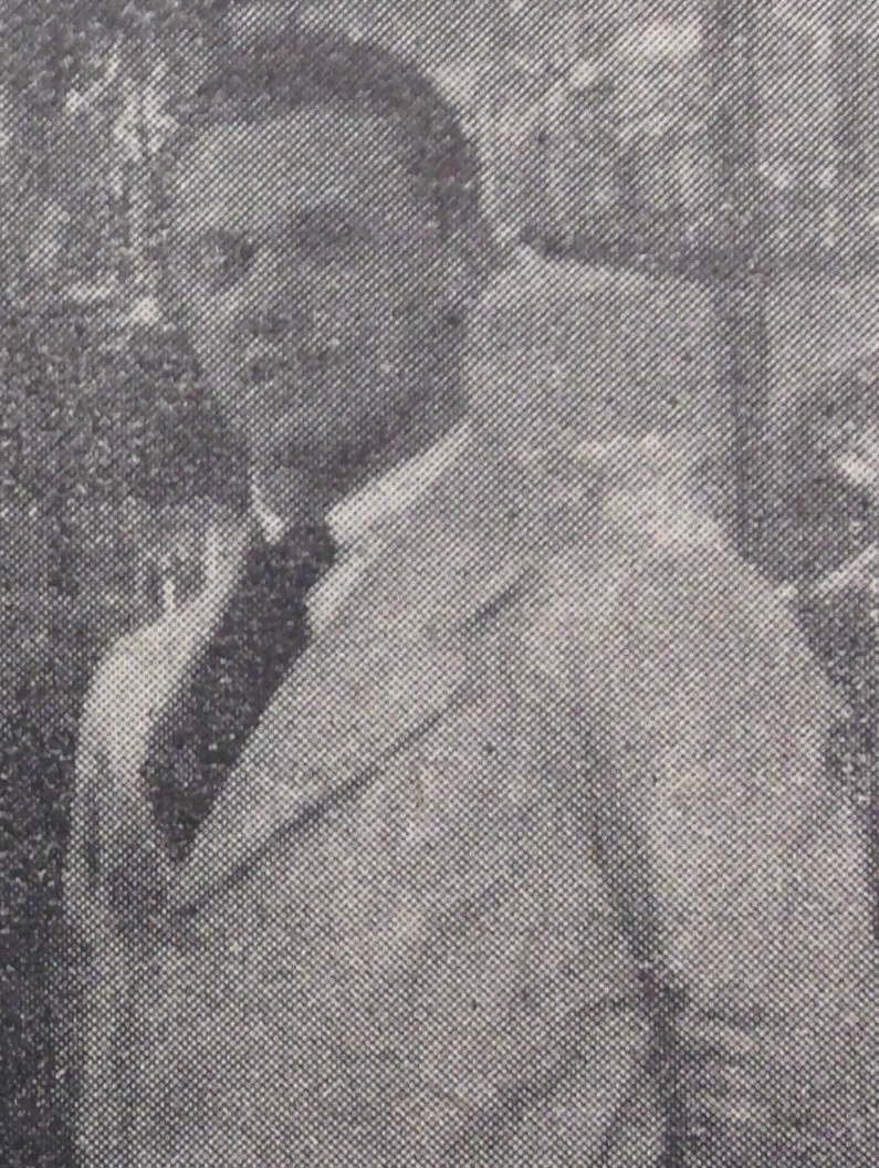 Paul Mehl mit seiner Mutter und seiner Schwester in seiner Düsseldorfer Gaststätte